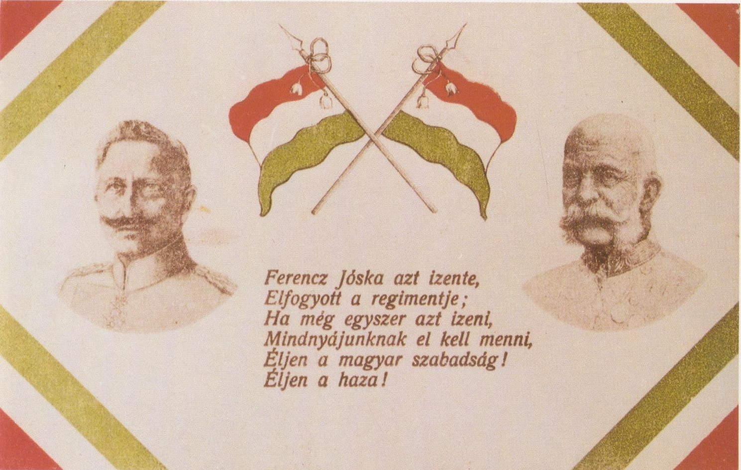 Első világháborús propaganda képeslap G.Gy. kiadása. Nyomda: Atheneum Rt. Budapest, 1915.